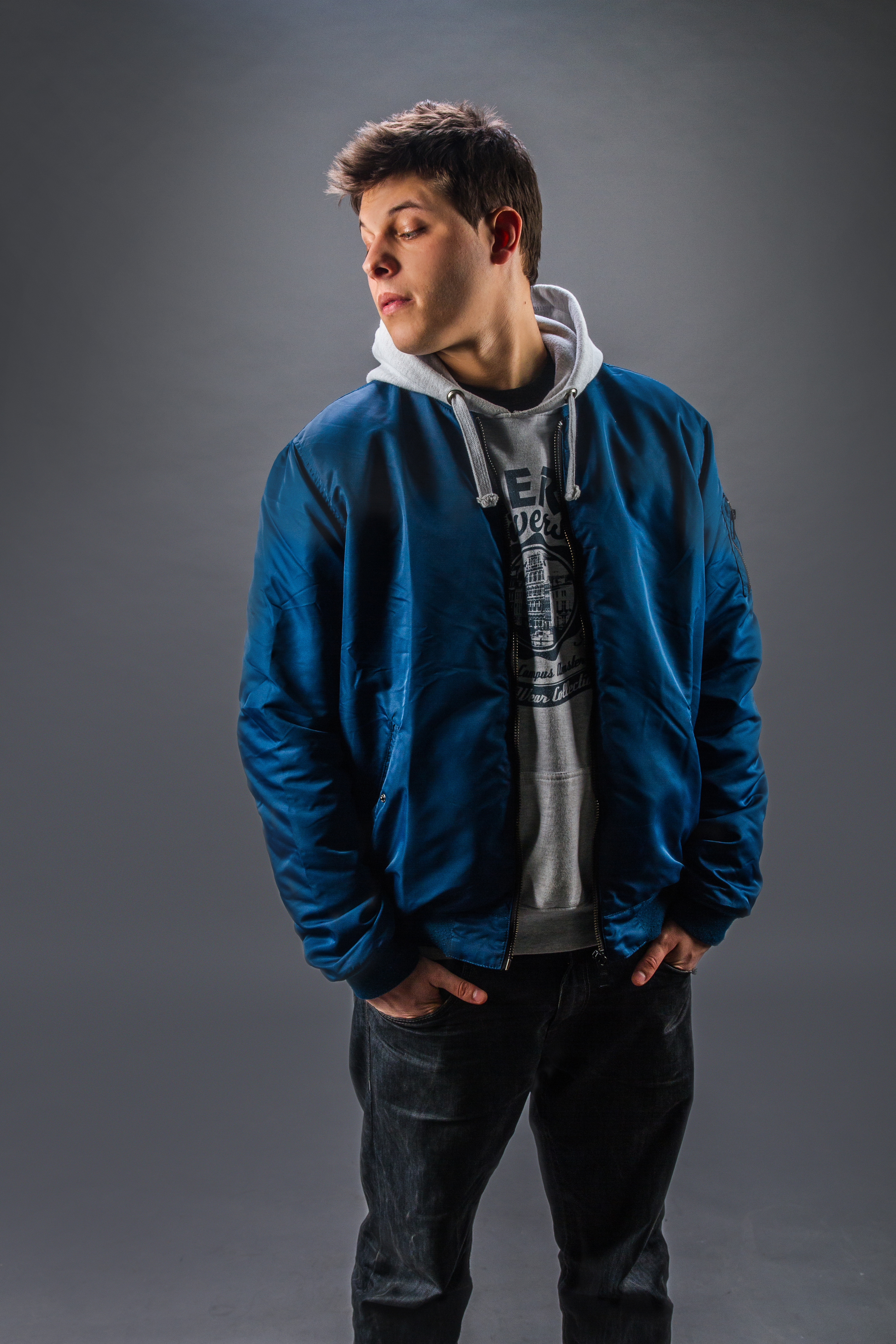 Srpski (latinica): Kendi (reper)